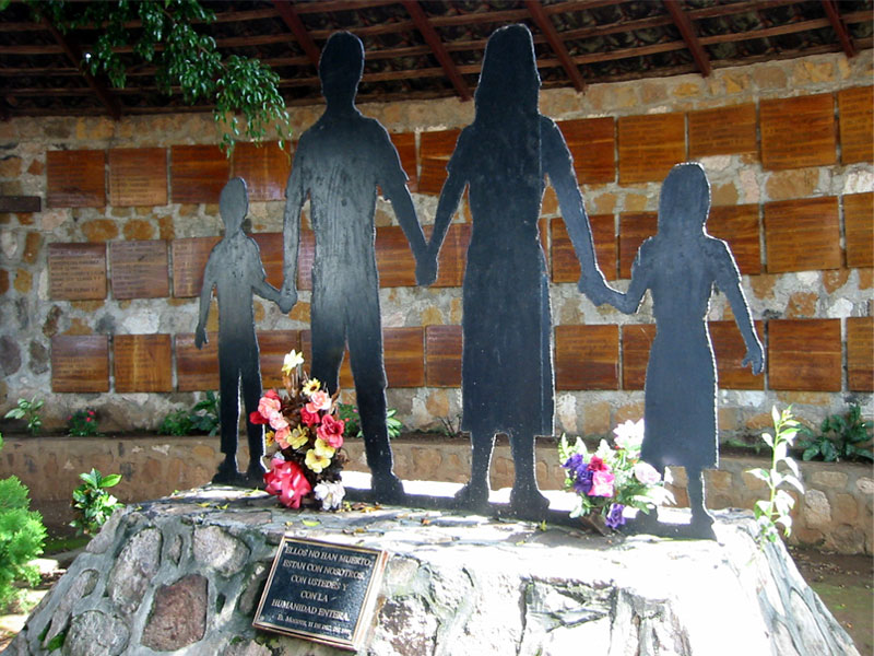 Memorial of massacre site at El Mozote, Morazan, El Salvador.